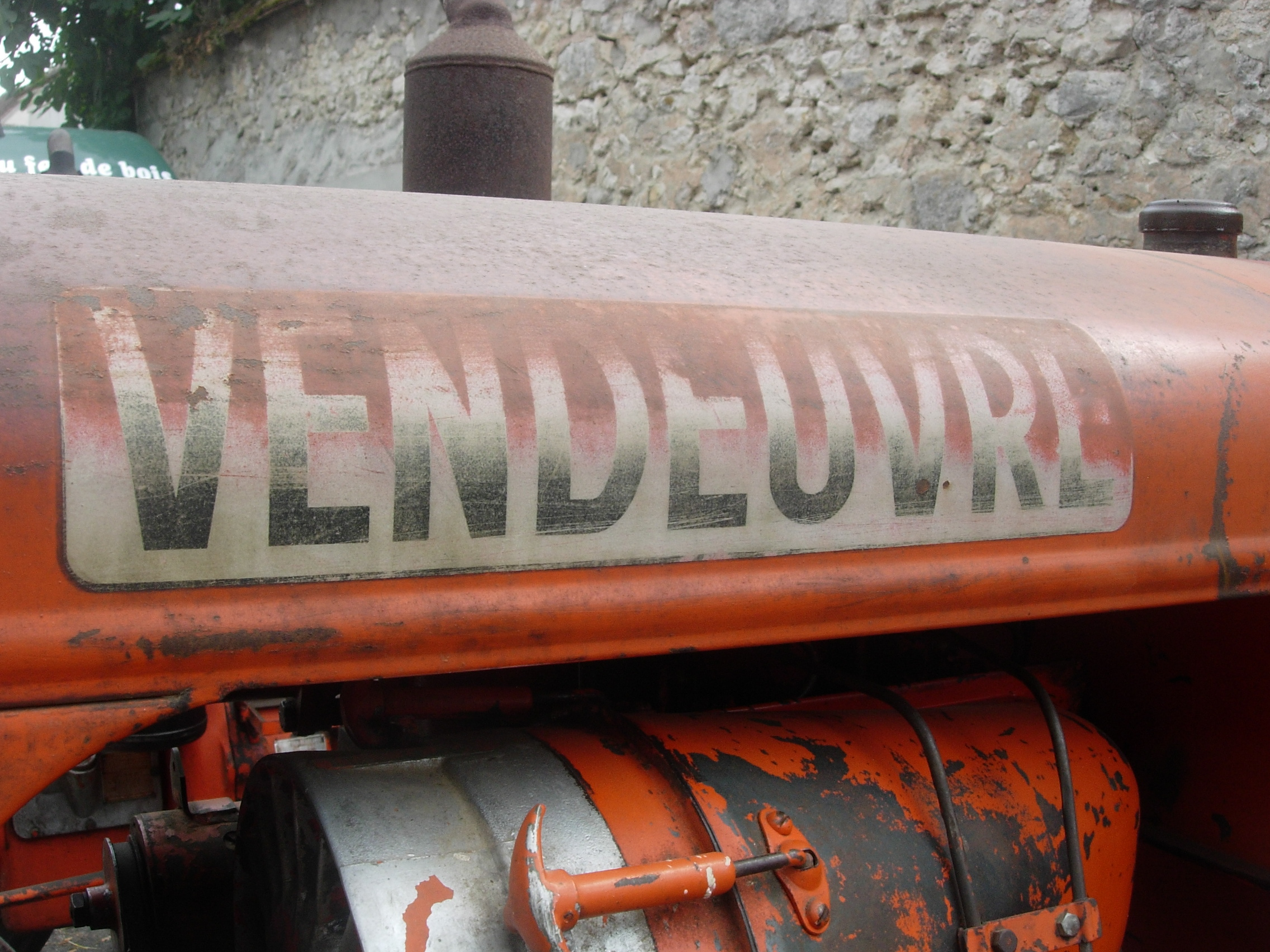 Tracteur Vendeuvre, Vendeuvre-sur-Barse, France